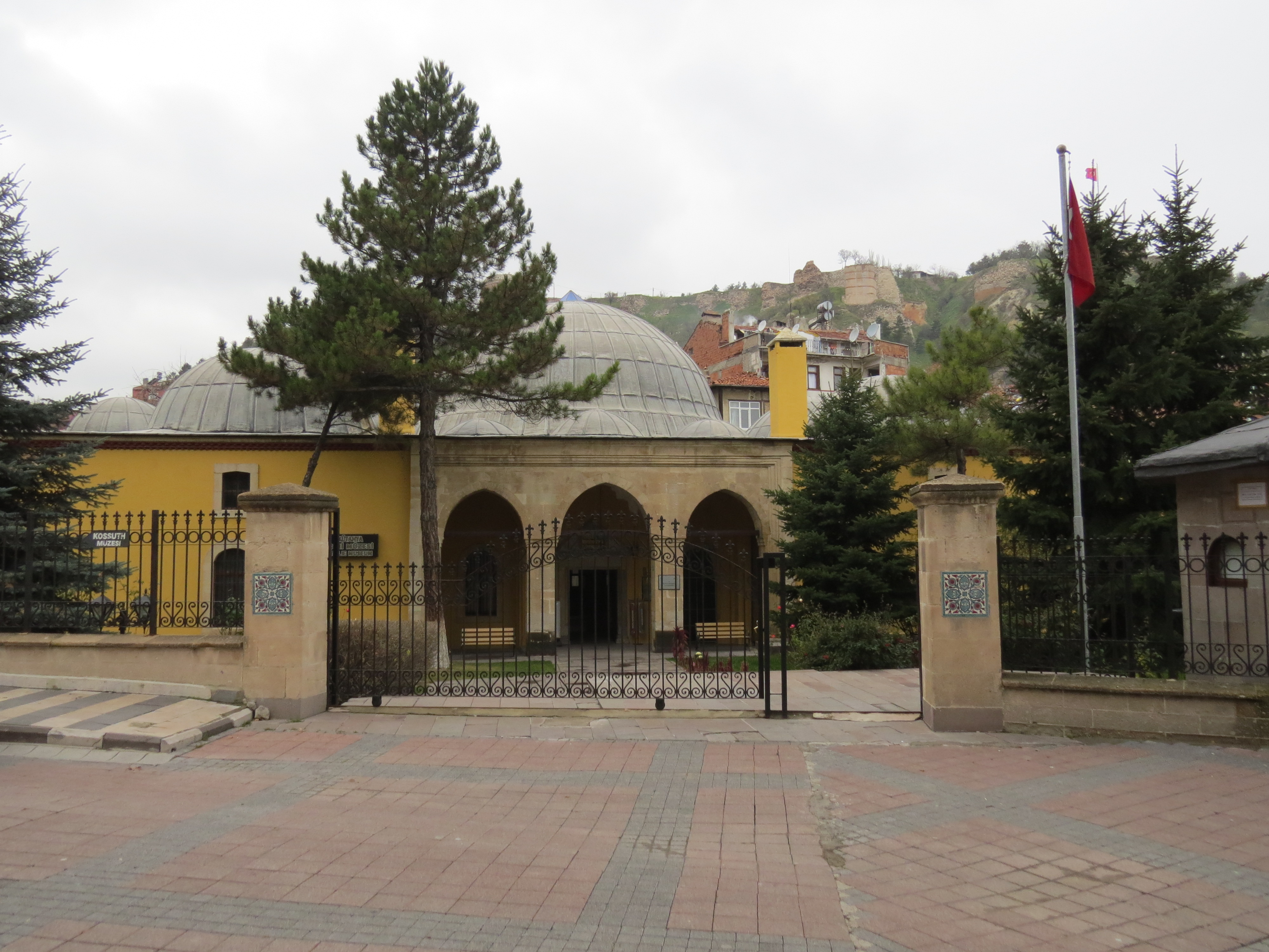 Yakup Bey Külliyesi, Kütahya.